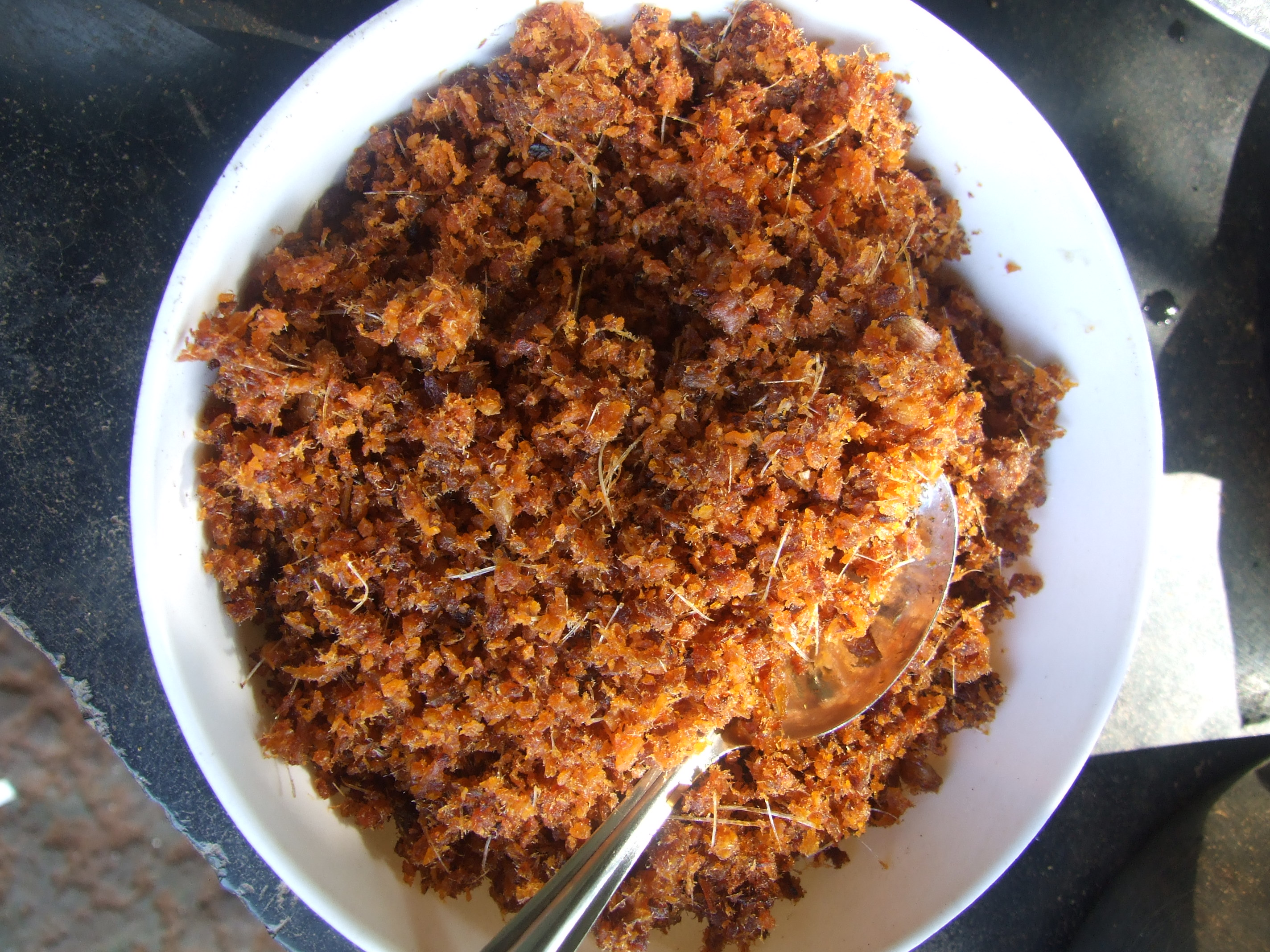 ചെറു മത്സ്യം